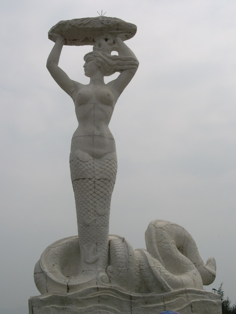 女娲补天全景